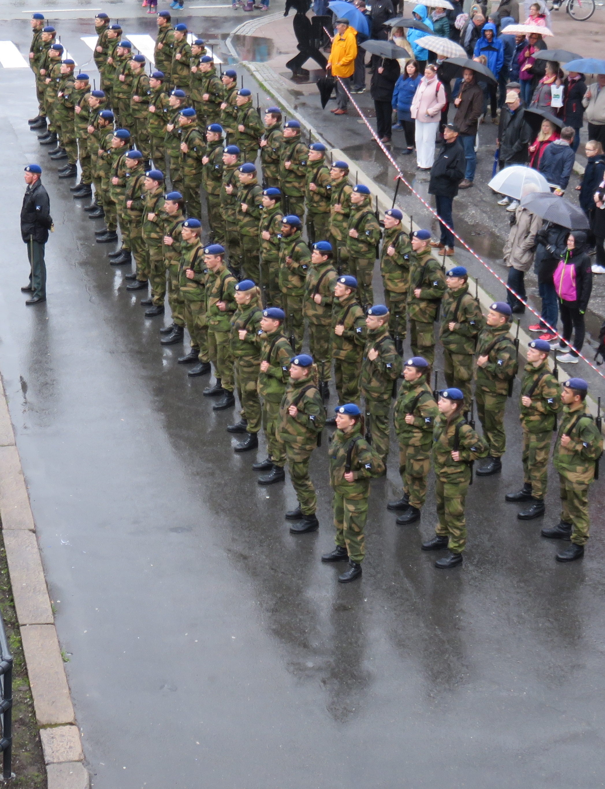 Brigad Nord-soldater i Narvik.